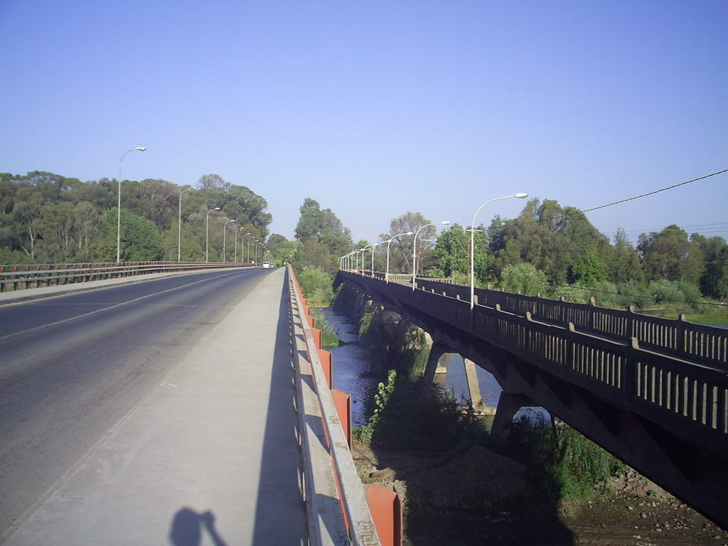 Vista de los 2 puentes que conectan Talca con Pencahue y el cerro de la Virgen. A la derecha el nuevo puente, y a la izquierda el antiguo que solo contaba con una pista de circulación.